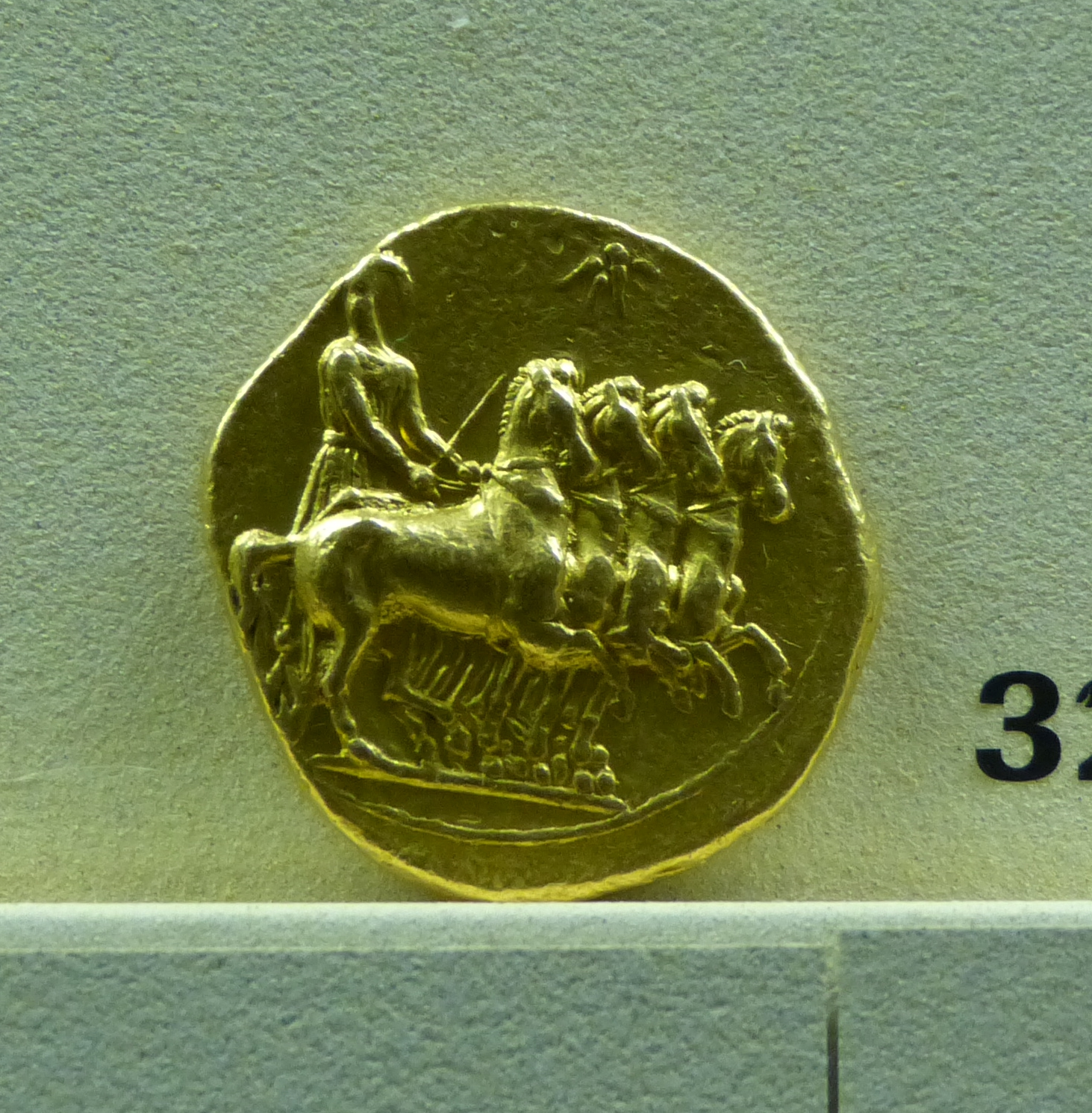 Museum der Universität Tübingen